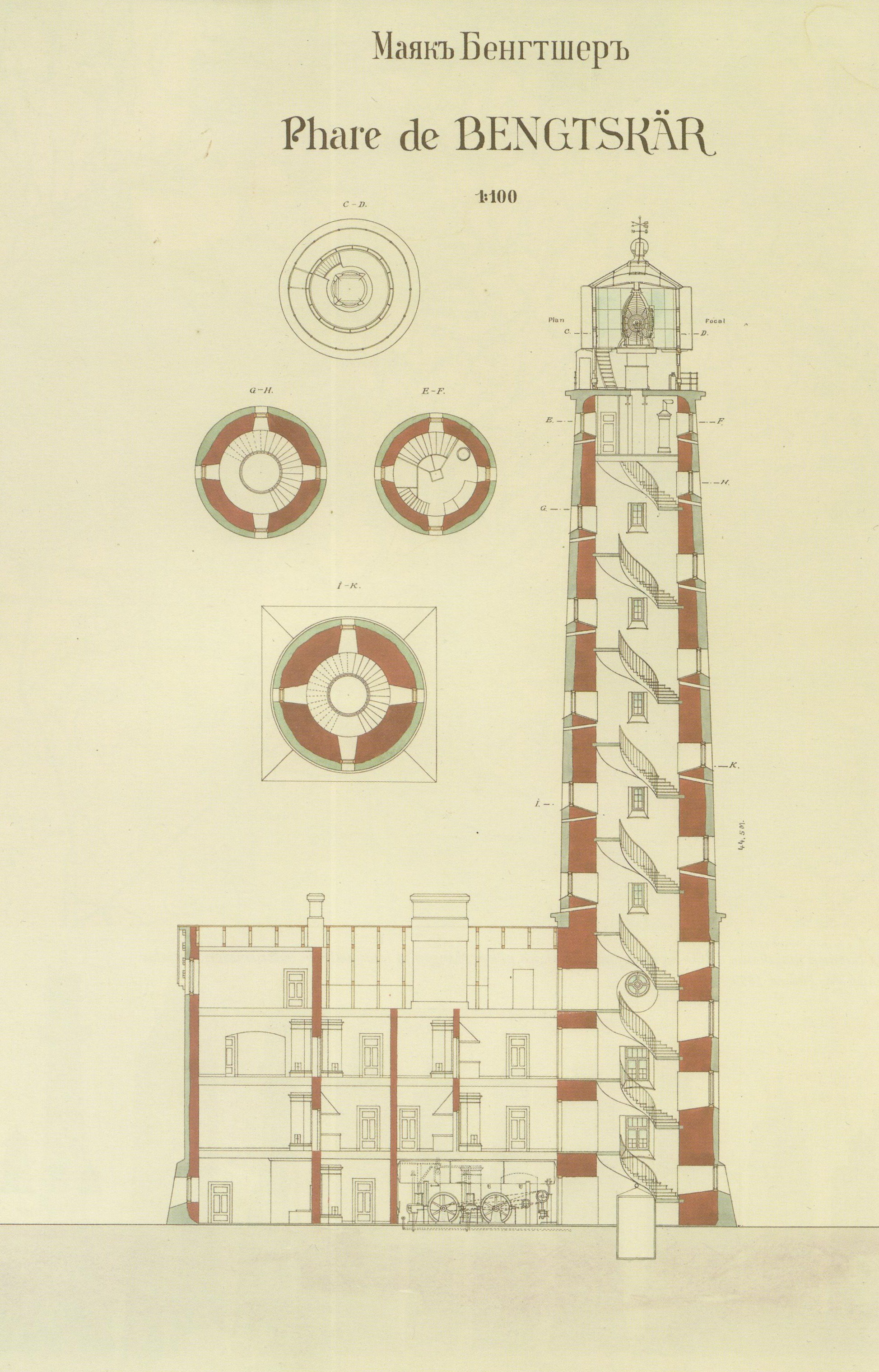 Bengtskärin majakan läpileikkaus. Se esiteltiin Pietarin merenkulkunäyttelyssä vuonna 1908.